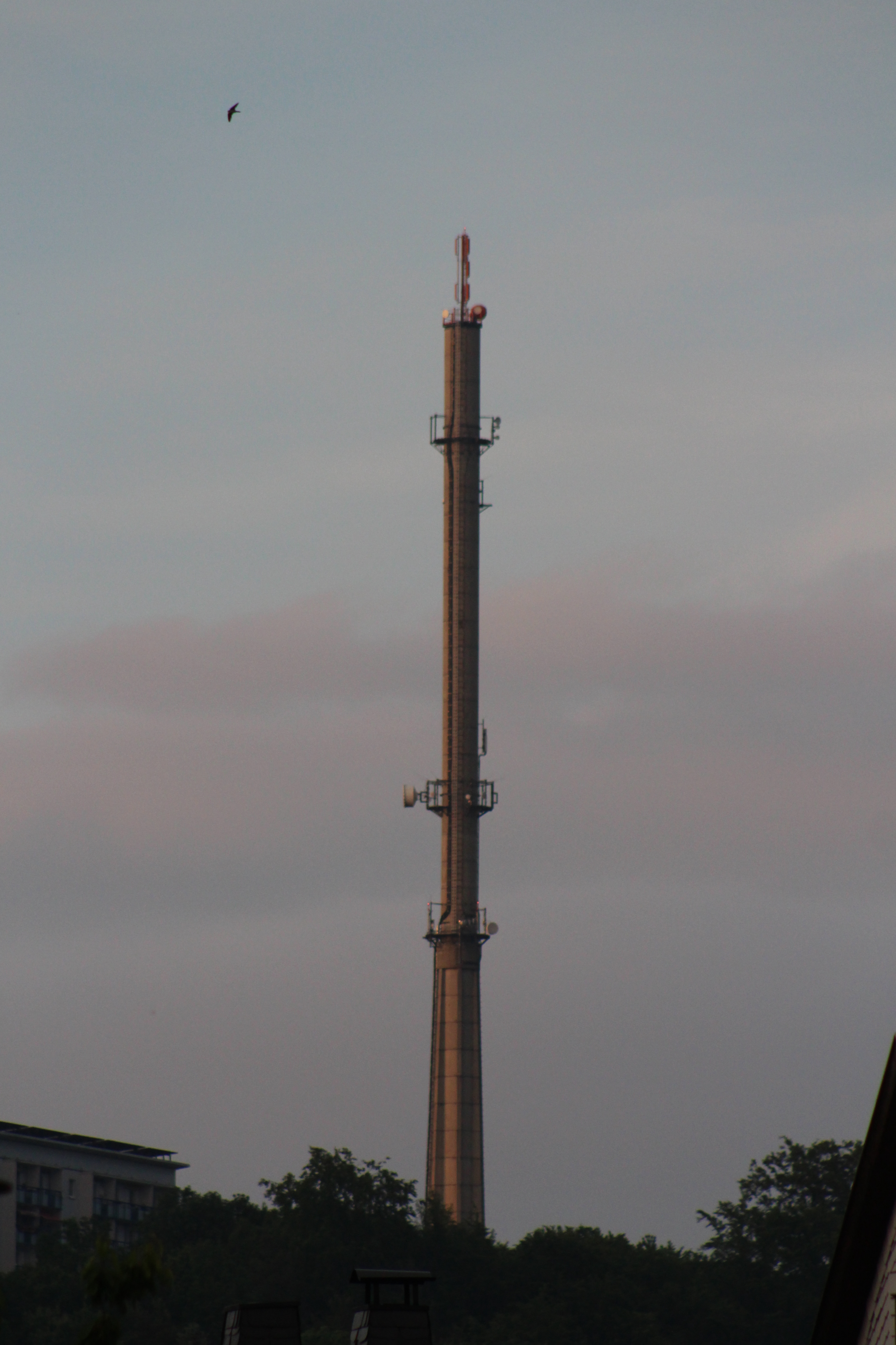 Kamin Heizkraftwerk Meiningen